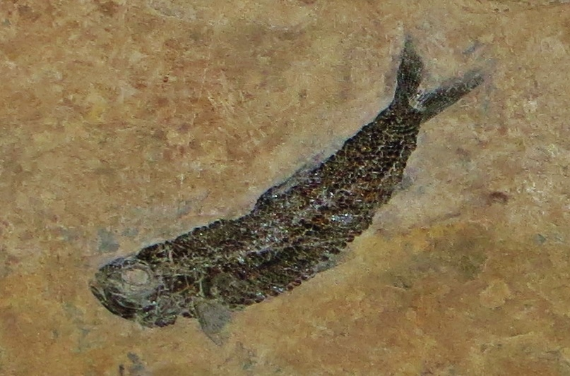 Fossil of Parapholidophorus, an extinct fish- Took the picture at Museo di Scienze Naturali, Bergamo